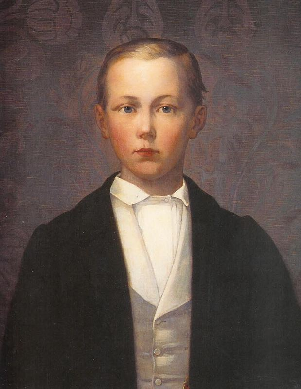 Portret van Johannes Willem van Reinhartshausen (overleden 1861)